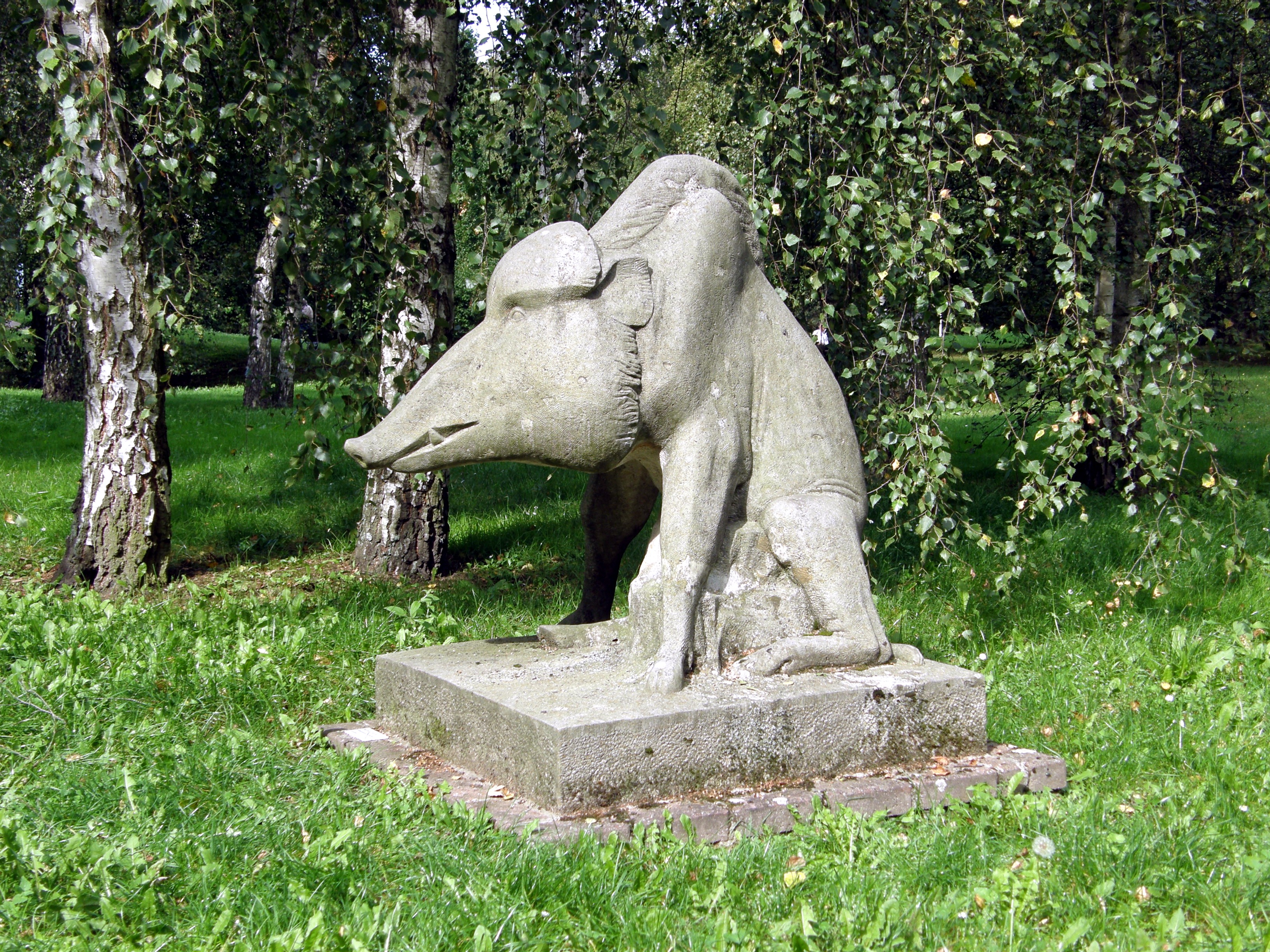 Bernau, Waldsiedlung, Keiler von Grzimek